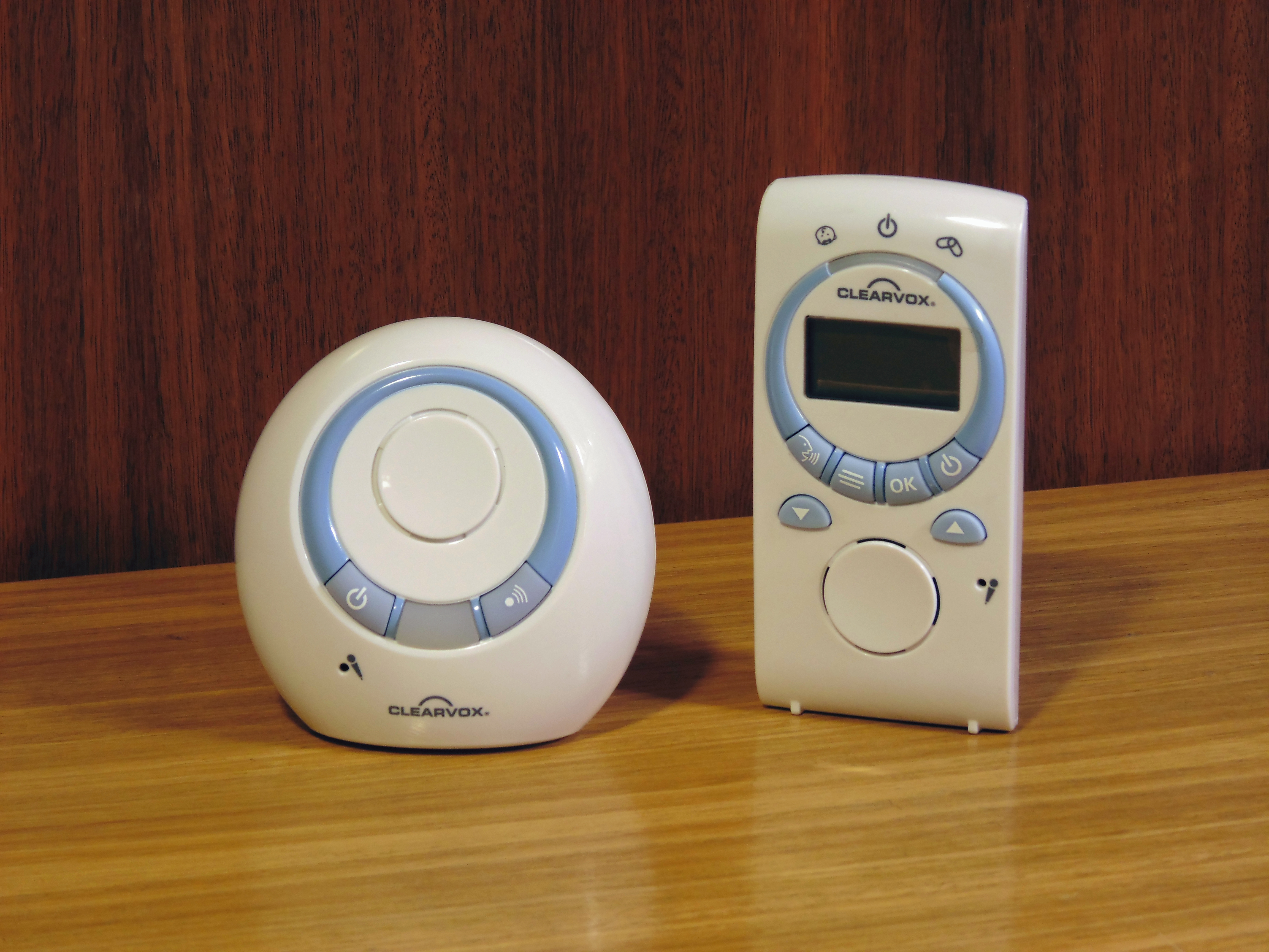 Un monitor de audio para bebés Clearvox. A la izquierda el dispositivo transmisor y a la derecha el receptor.